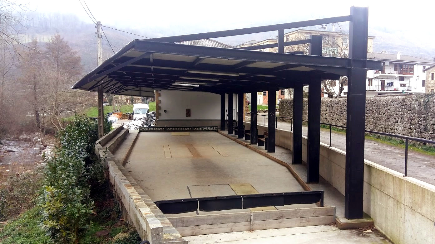 Bolera cubierta de bolo pasiego situada en la localidad cántabra de Vega de Pas, España